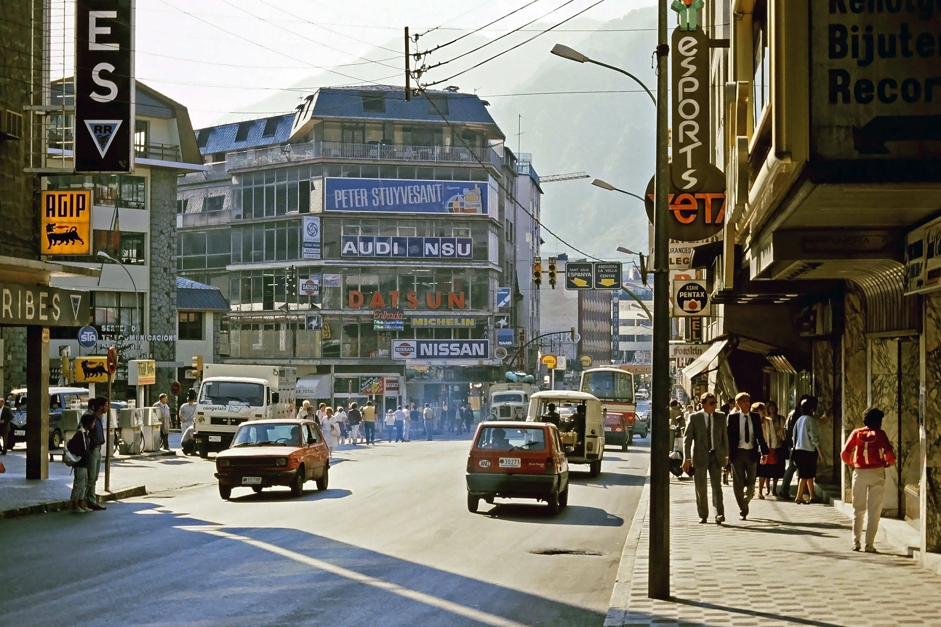 Andorra